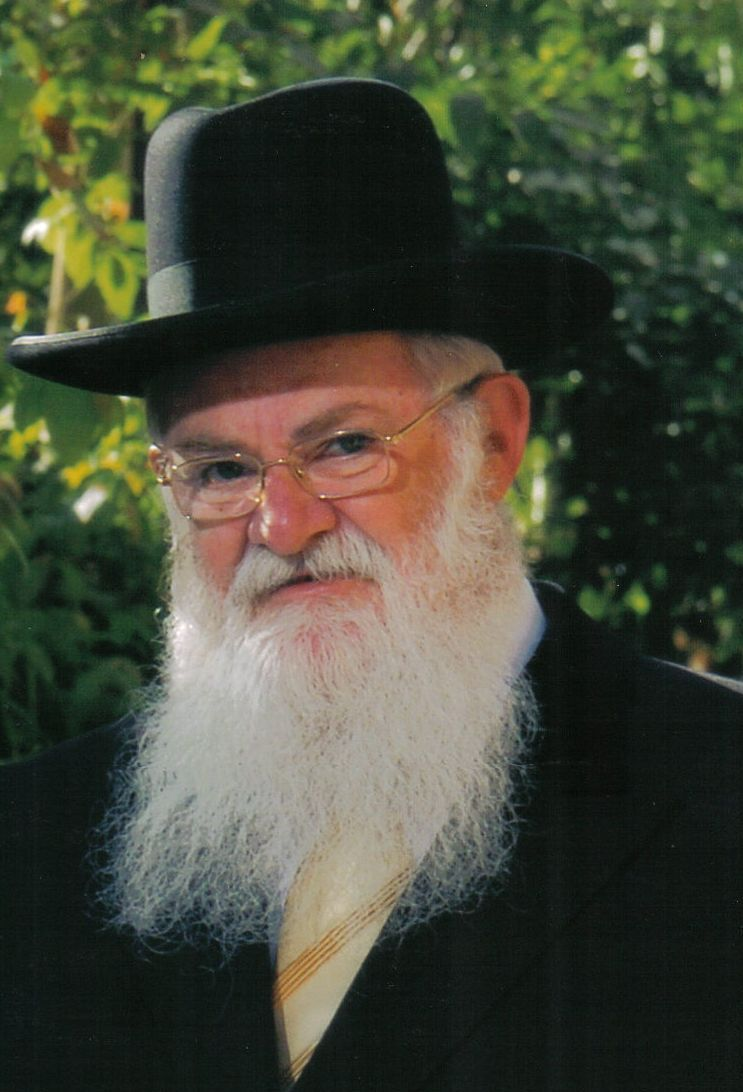 הרב בן ציון נשר